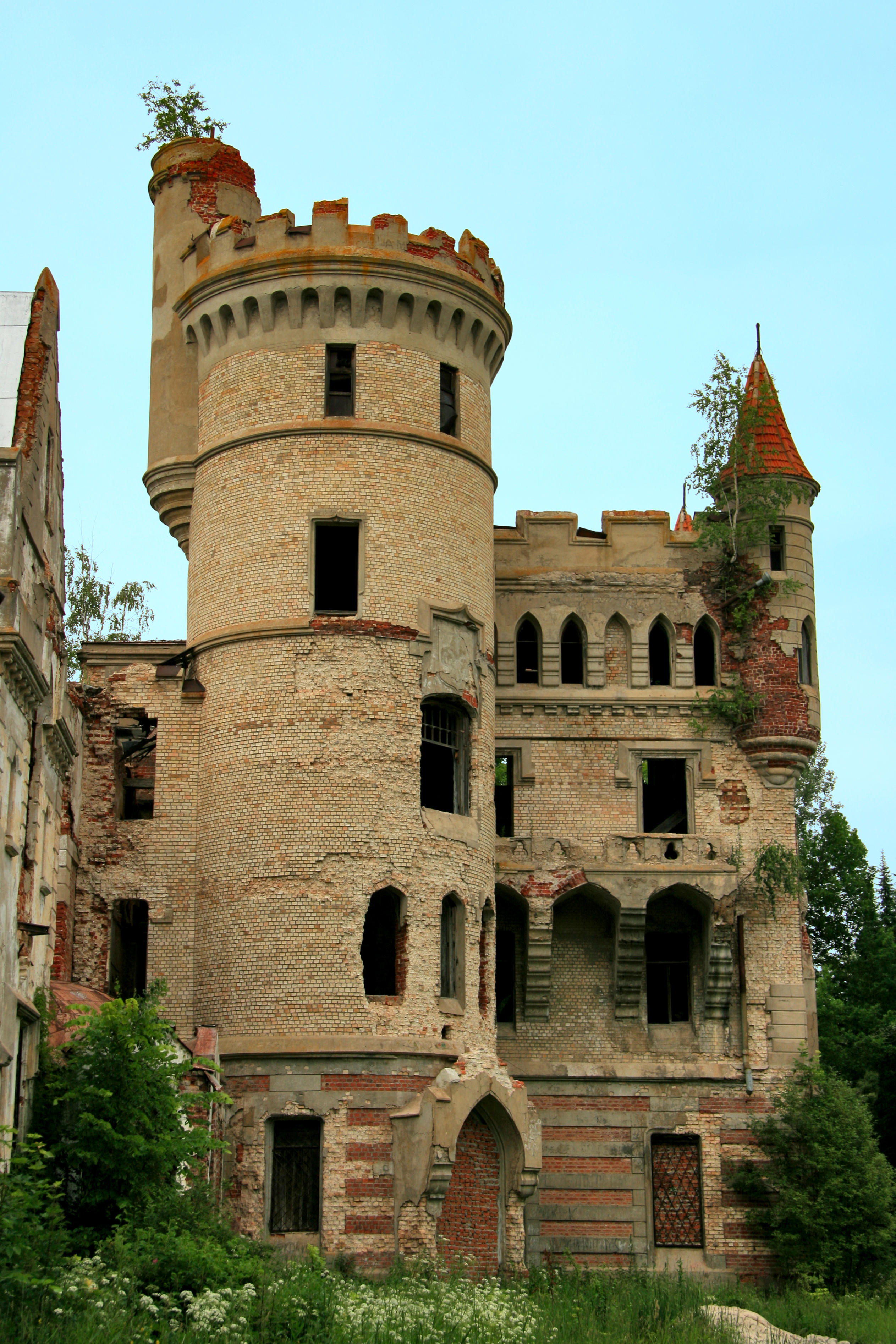 Усадьба Храповицкого «Муромцево» (Владимирская область, Судогда, посёлок Муромцево)